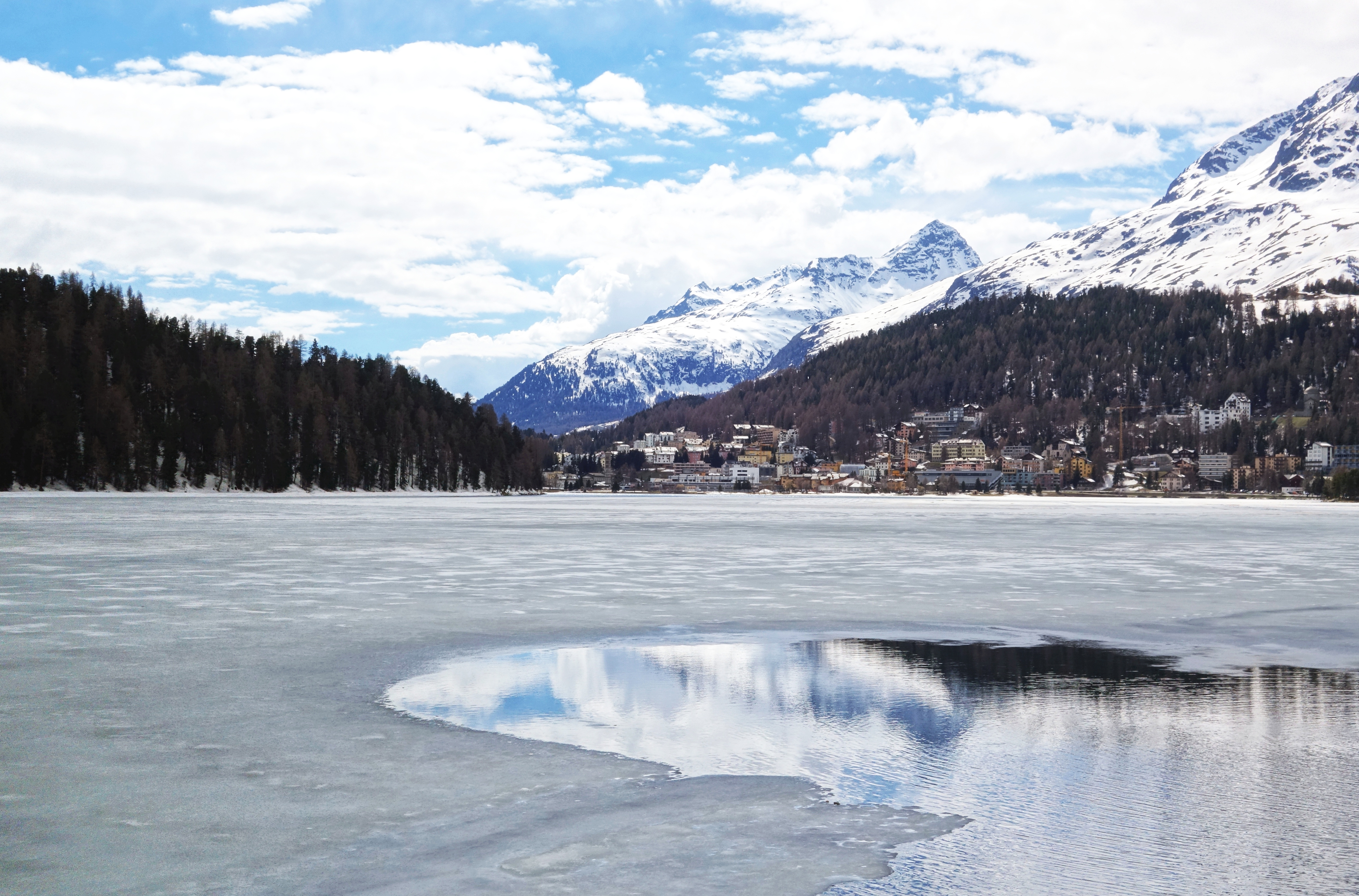 St. Moritz mit See bei Tauwetter